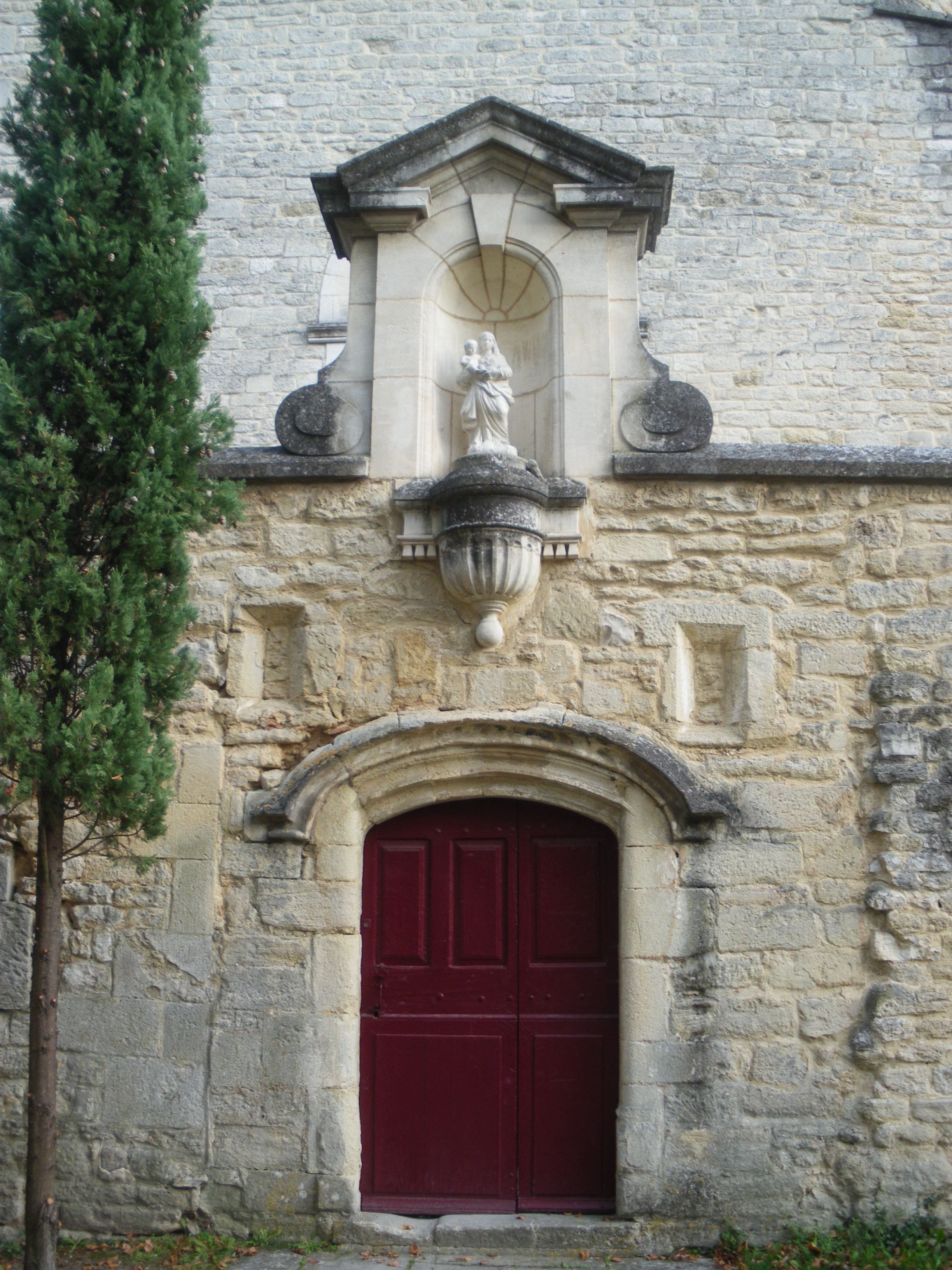 Notre Dame du Groseau, Malaucène, Vaucluse, France